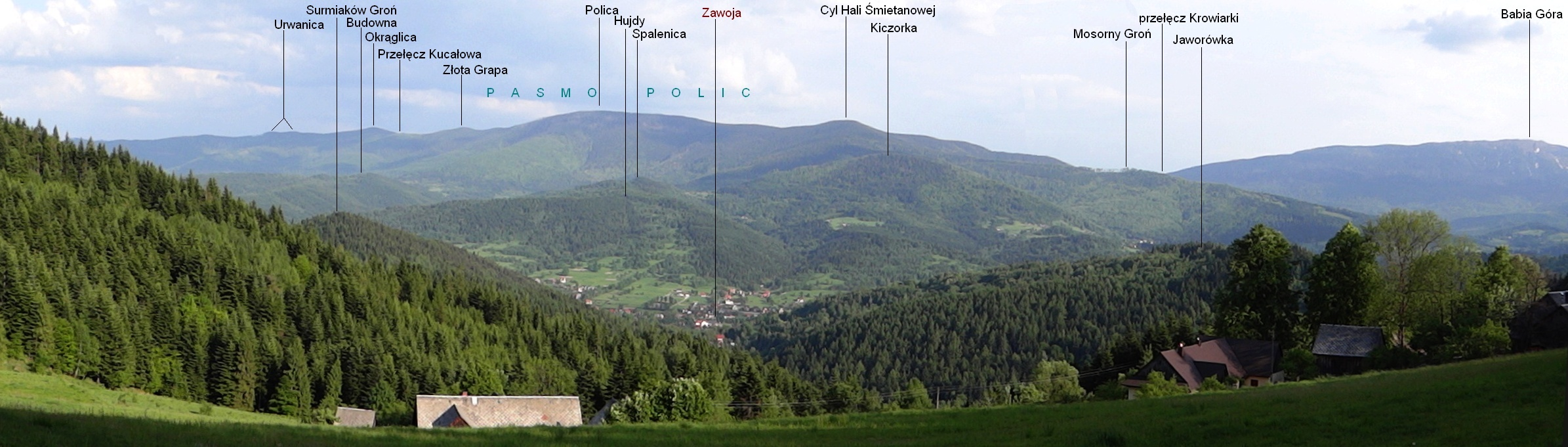 Widok spod Solniska w grzbiecie Pasma Przedbabiogórskiego